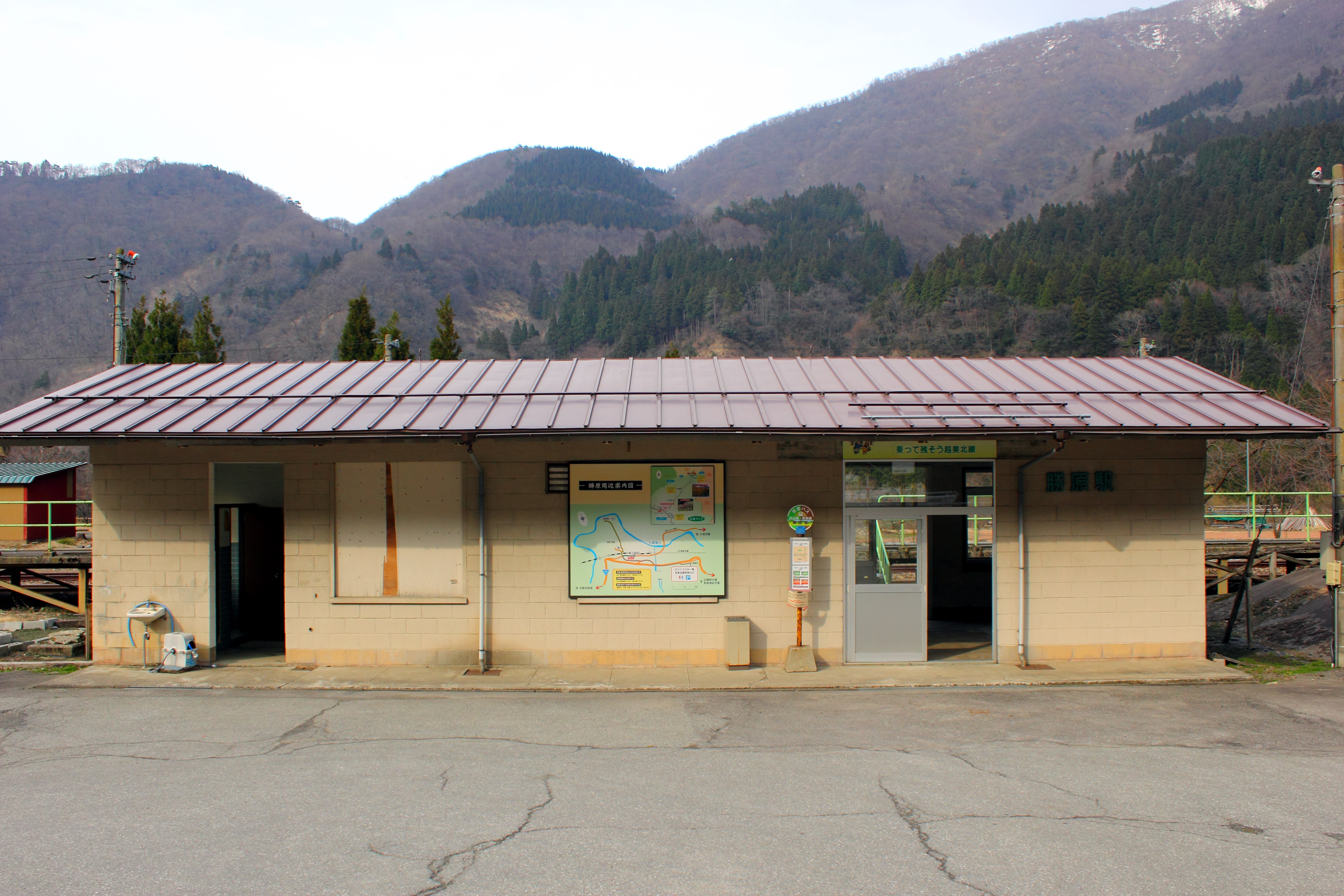 勝原駅 2013.3.24